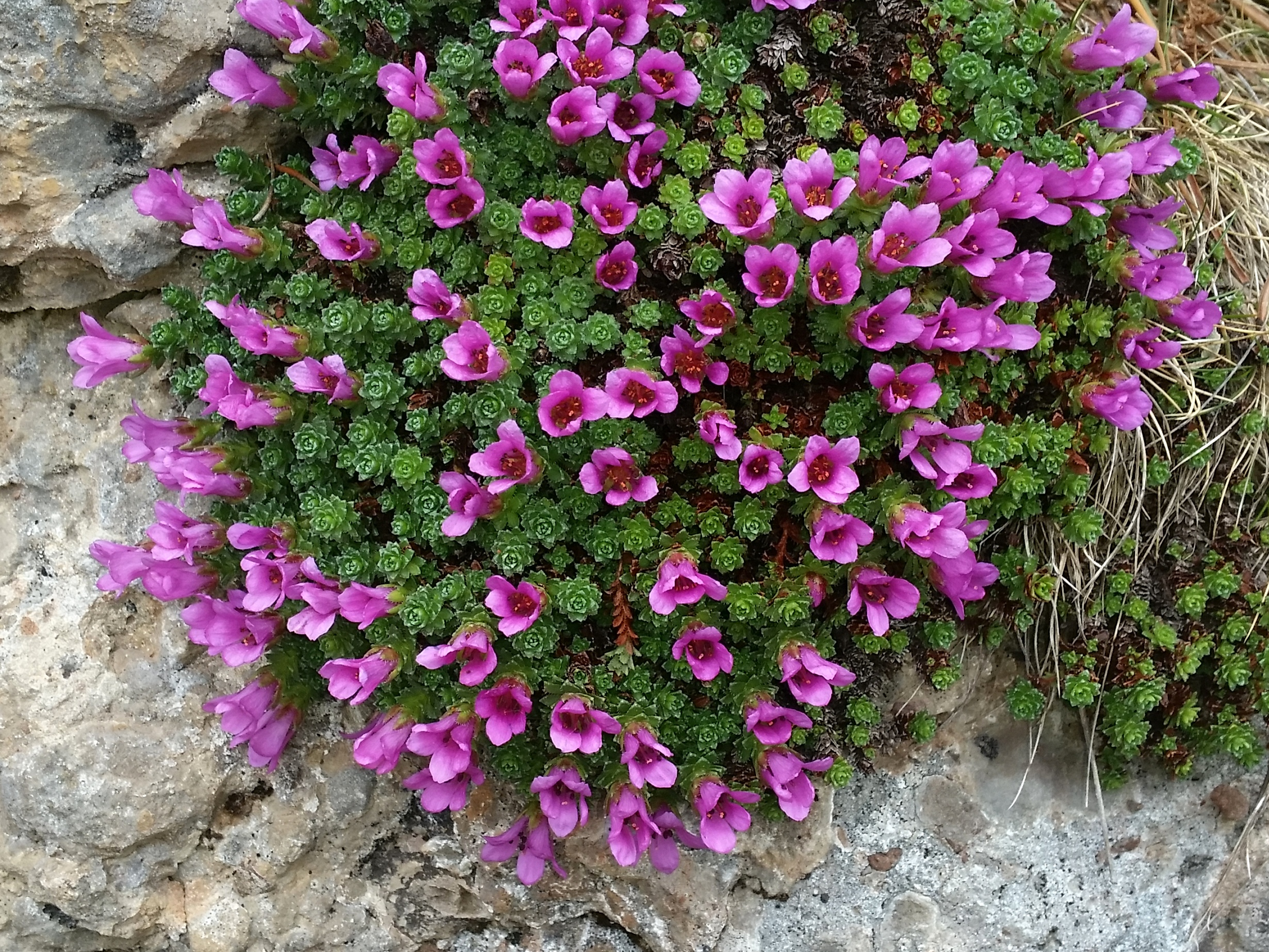 Saxifraga oppositifolia